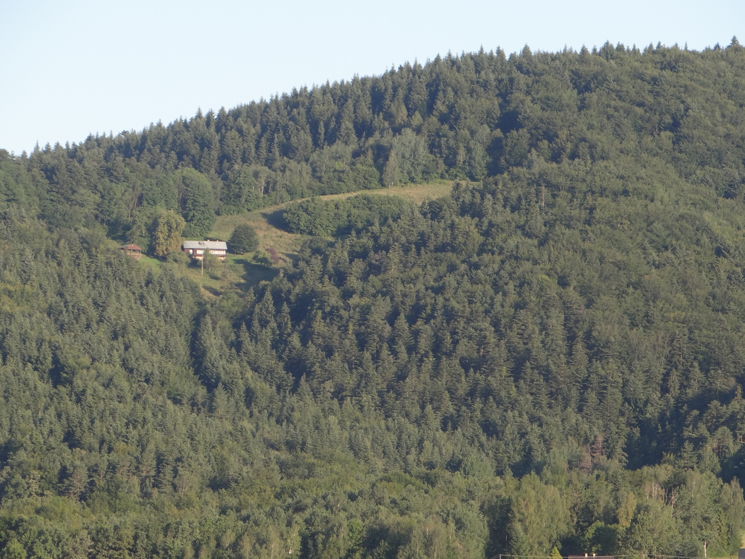 Ciecień od strony Skrzydlnej. Polana Kadłuby